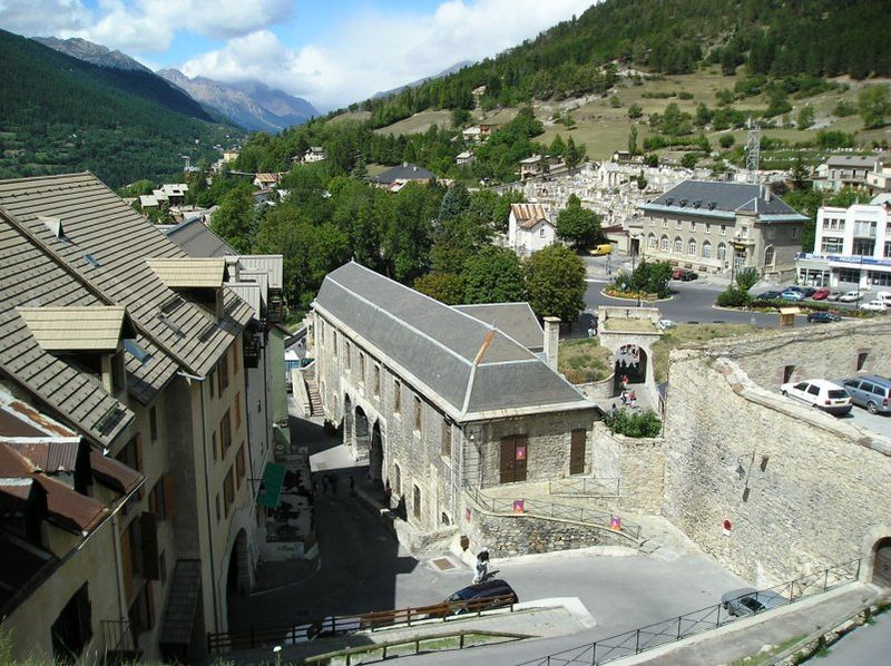 Place forte de Briançon Photo prise par François Trazzi